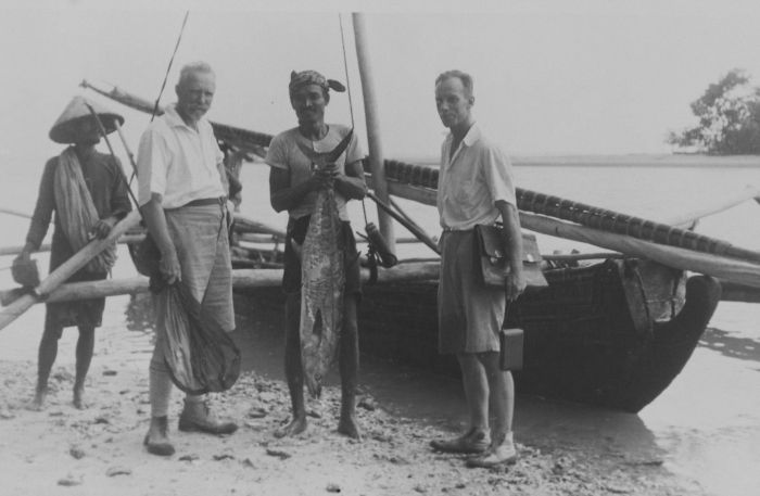 foto. Mannen bij aankomst op het strand van Moearabinoeangeun, na een verblijf op Trouwers-eiland (Poelau Tindjil), met een op zee gevangen tengiri